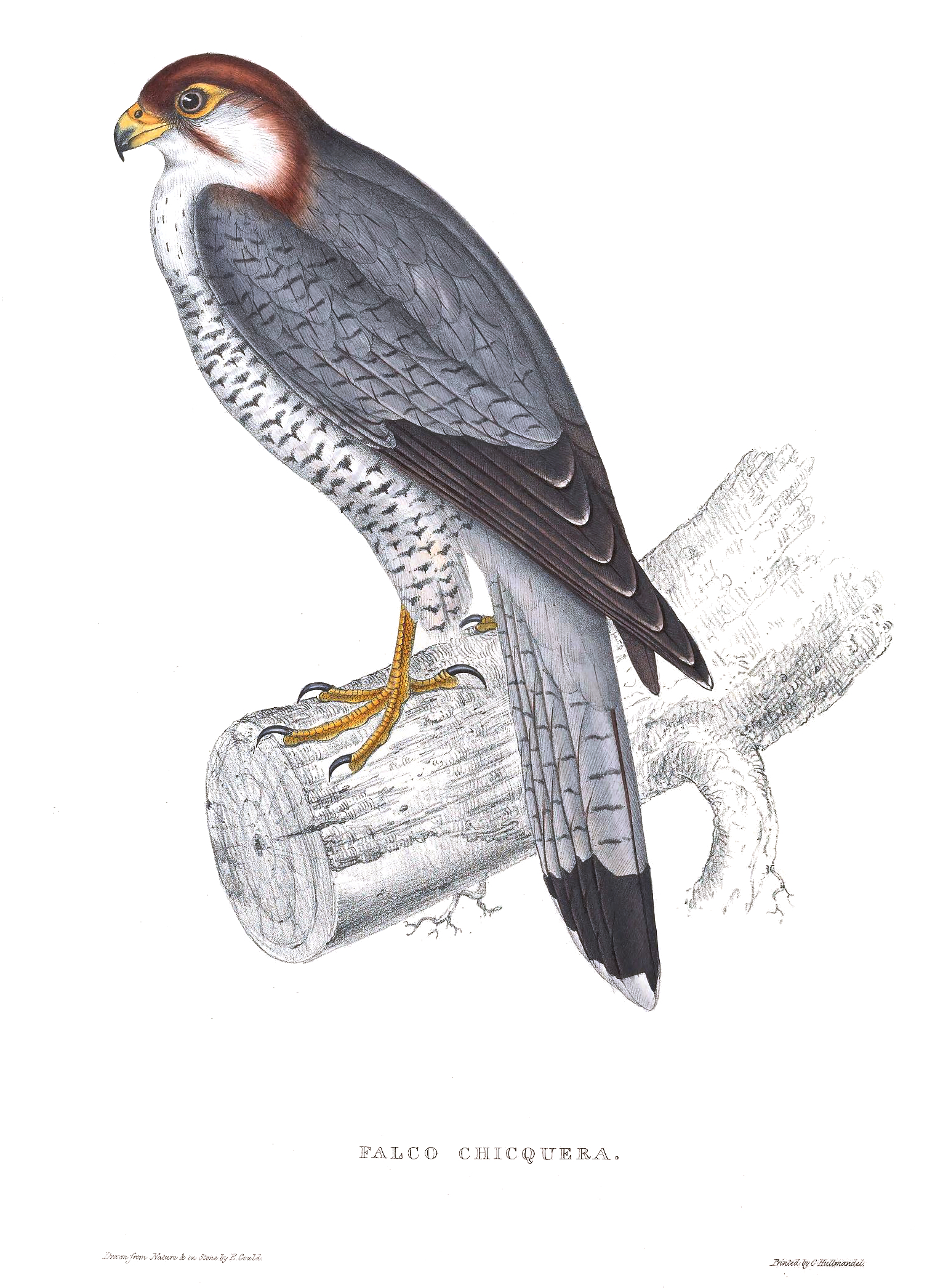 Falco chicquera